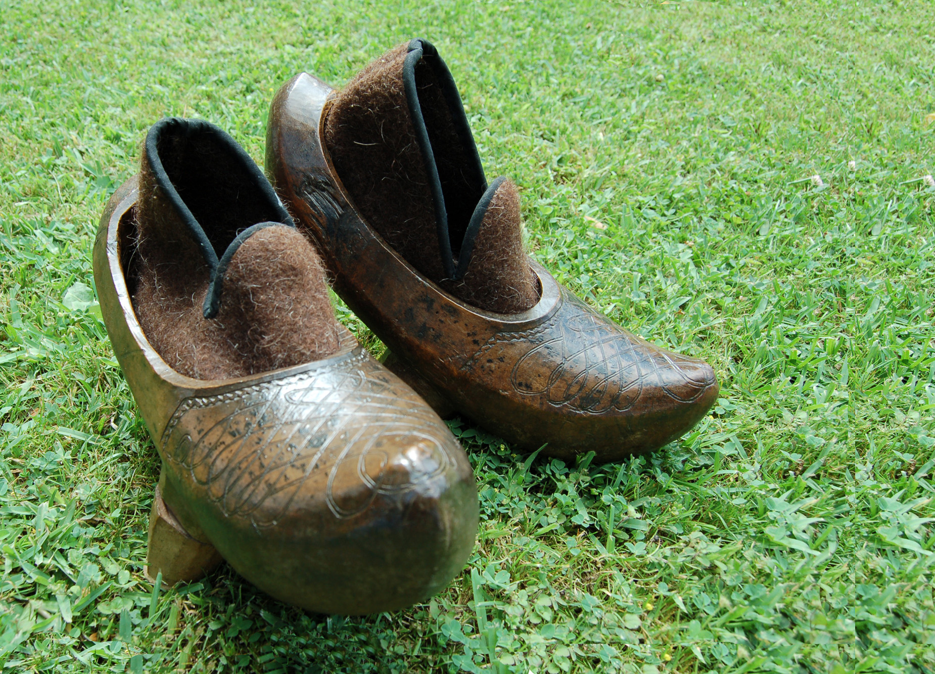 Albarcas Carmoniegas con escarpines.Museo Etnográfico de Cantabria. Nº de inventario: 323